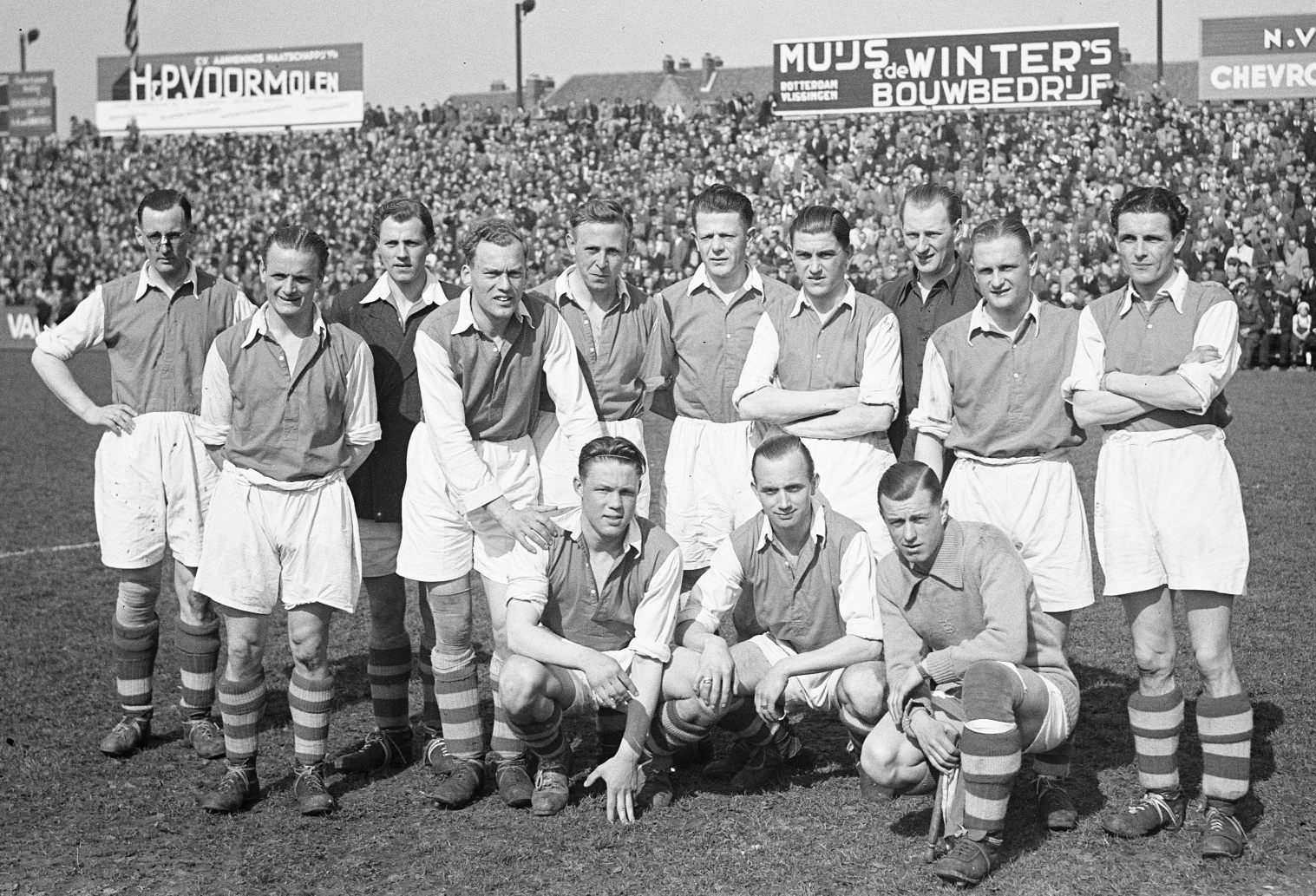 Sparta tegen Ajax 3-1. Ajax elftal:staand vlnr: Joop Stoffelen, Ger Stroker, ?, Gerrit Fischer, Gerard Bruins, Jany van der Veen, Jan Potharst, Gerrit Keizer, Gé van Dijk, Guus Dräger;zittend vlnr: Rinus Michels, Arend van der Wel, Theo Brokmann jr..